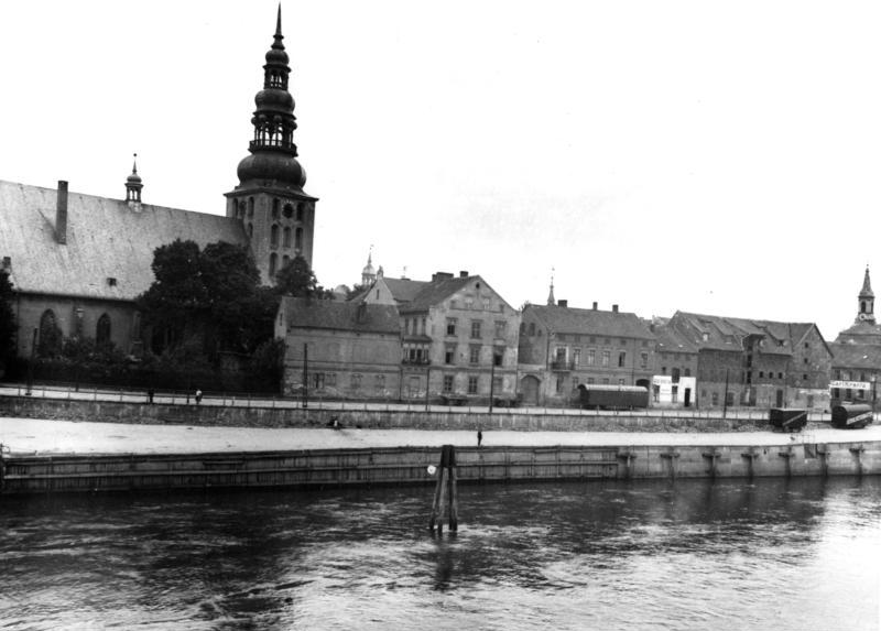 Tilsit (Ostpreußen) Blick vom nördlichen Memelufer auf die Stadt